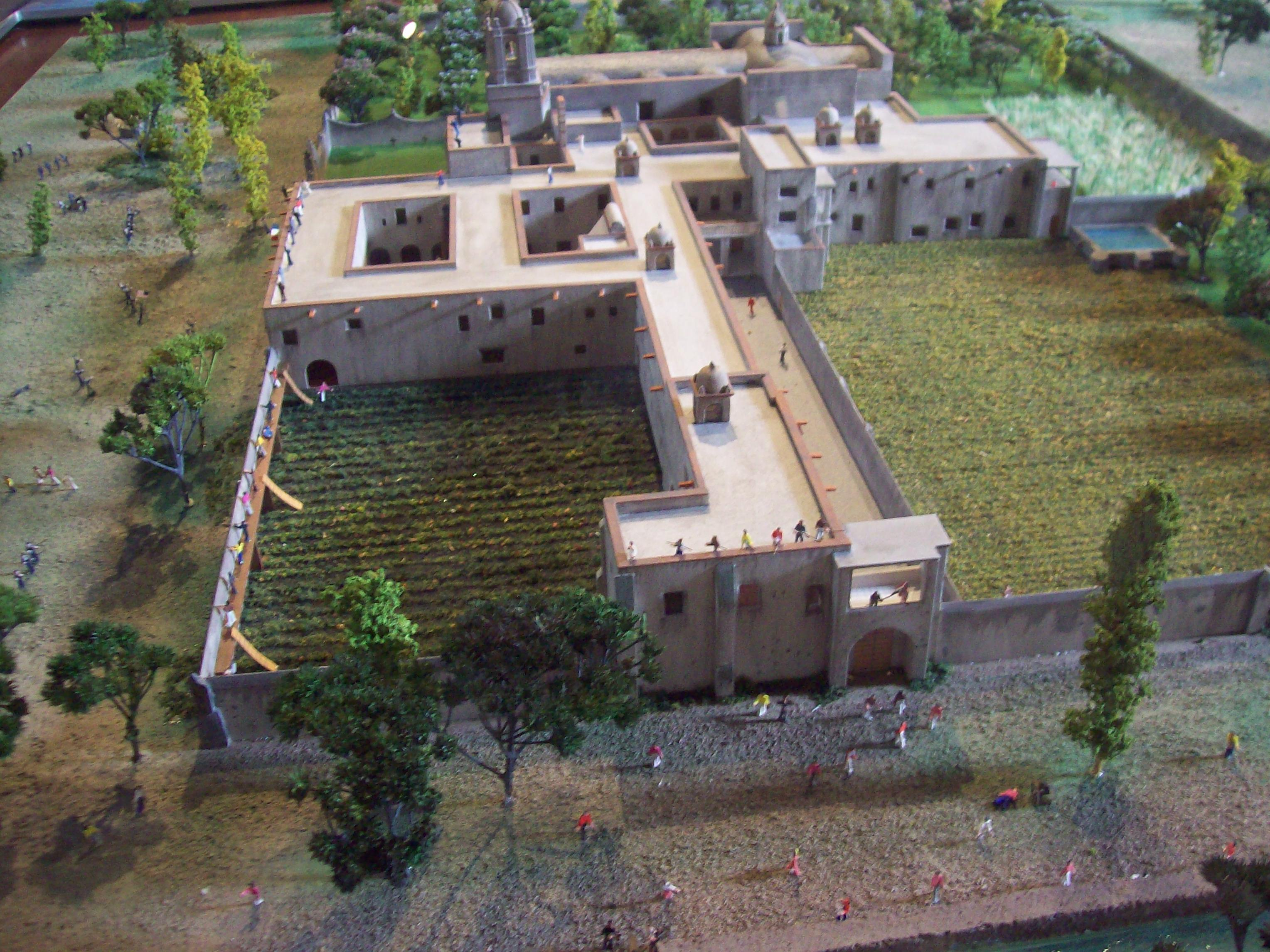 Maqueta de la batalla de Churubusco. Museo Nacional de las Intervenciones